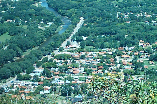 Santa Rosa de Calamuchita desde le Vía Crucis, en la provincia de Córdoba, Argentina.